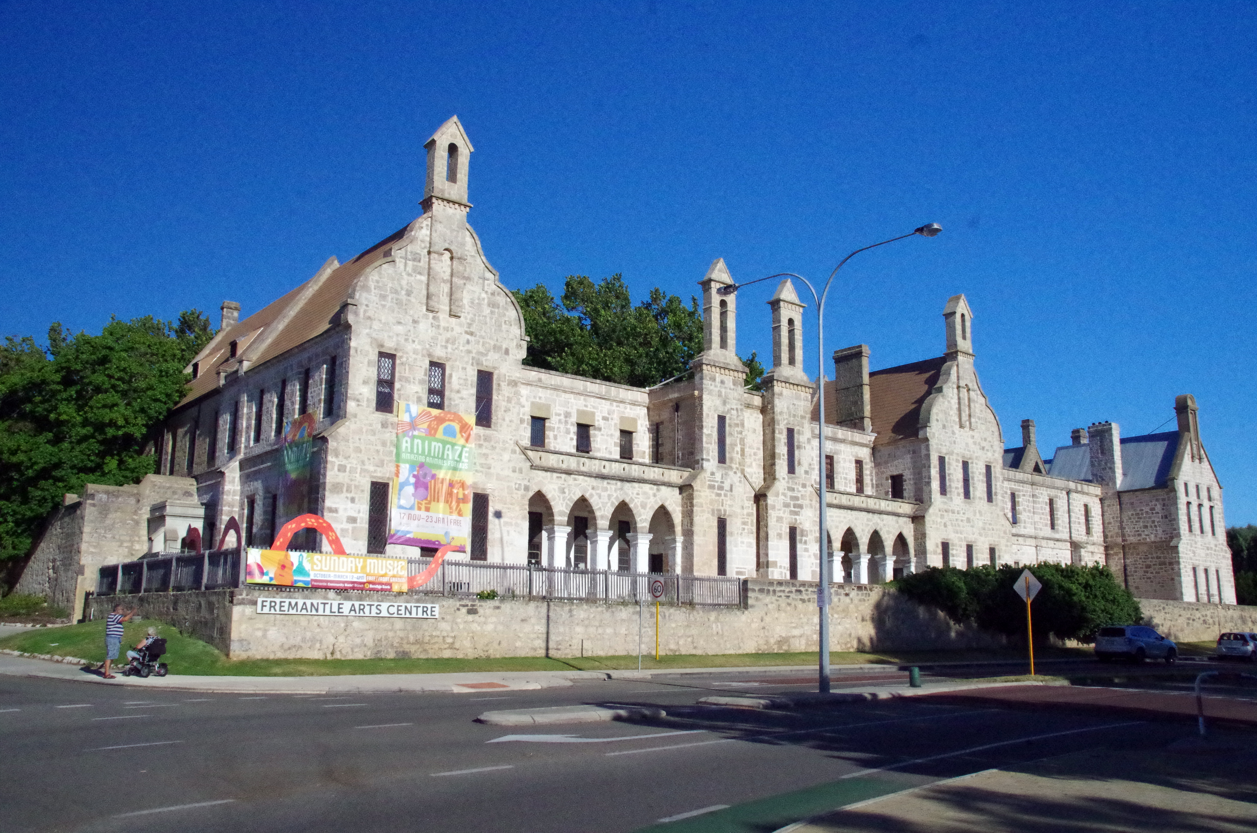 Fremantle, Western Australia